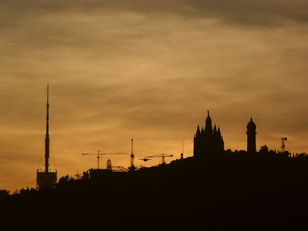 Descripción: Perfil del Tibidabo al atardecer Fecha: 20/12/2003 Hora: 16:59 Cámara: DiMAGE 7Hi ISO: 100 Tv: 1/250 Av: 8 Autor: aTarom